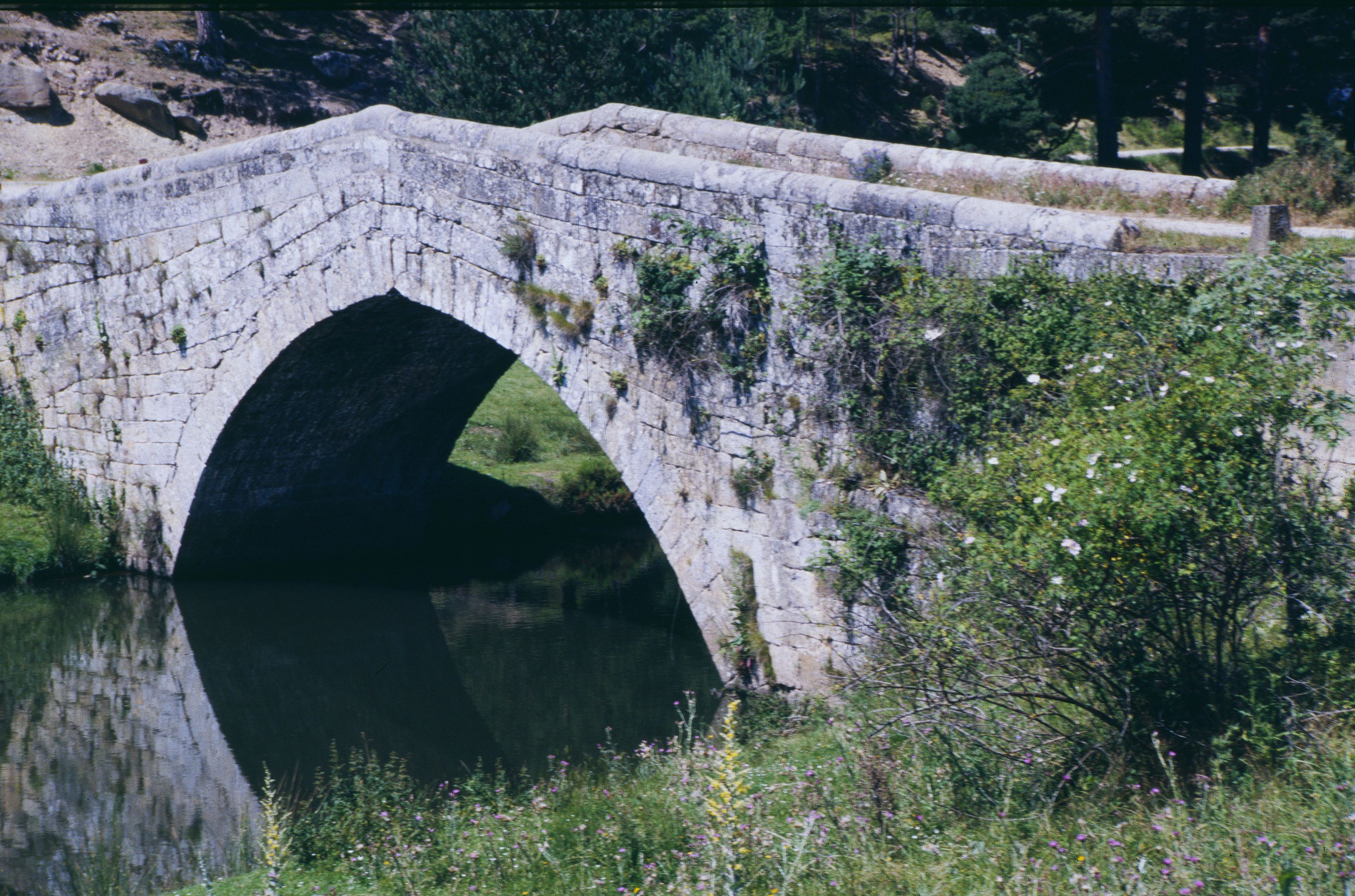 Brücke bei Covaledo